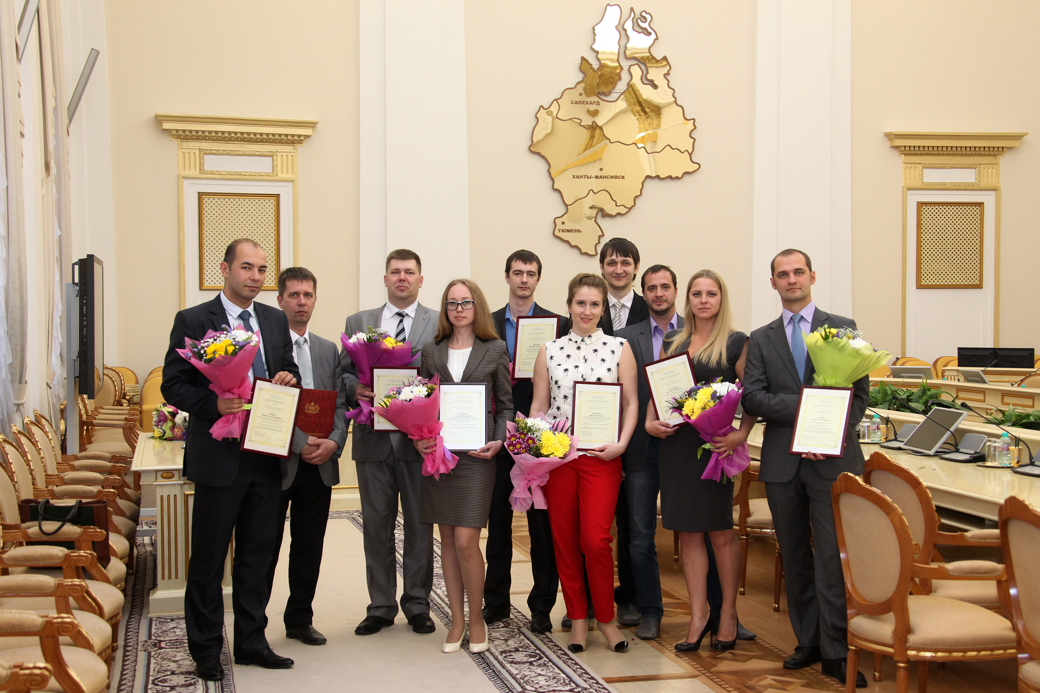 Сотрудники ООО «ТюменНИИгипрогаз» – лауреаты конкурса «Инженер года – 2015». г. Тюмень, Правительство Тюменской области.